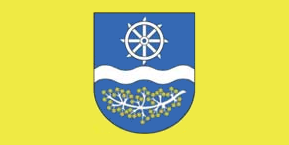 Флаг города Крупки и Крупского района, Беларусь